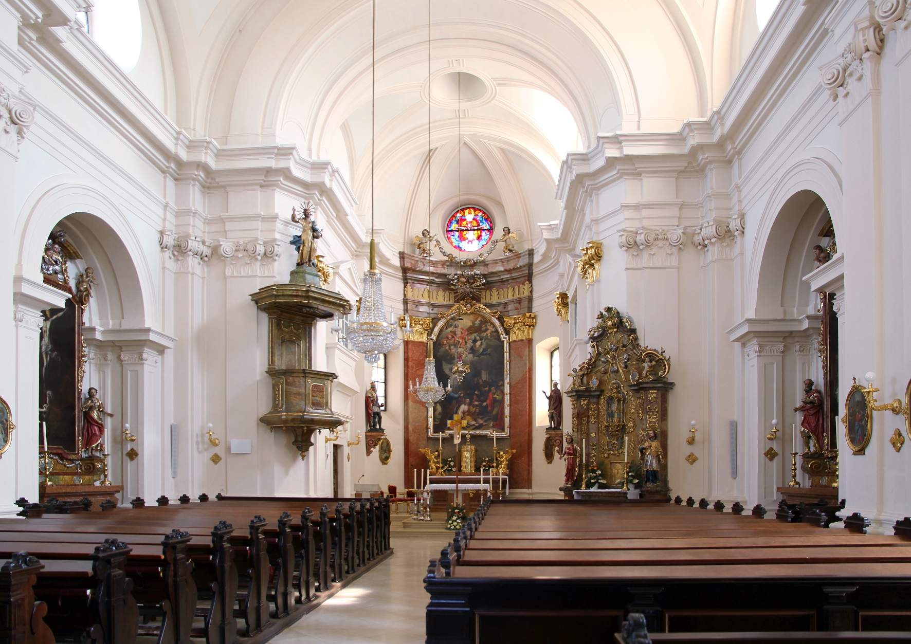 Die Innenansicht der kath. Pfarrkirche Hll. Dreifaltigkeit, Simon und Judas in der burgenländischen Marktgemeinde Oggau am Neusiedler See.